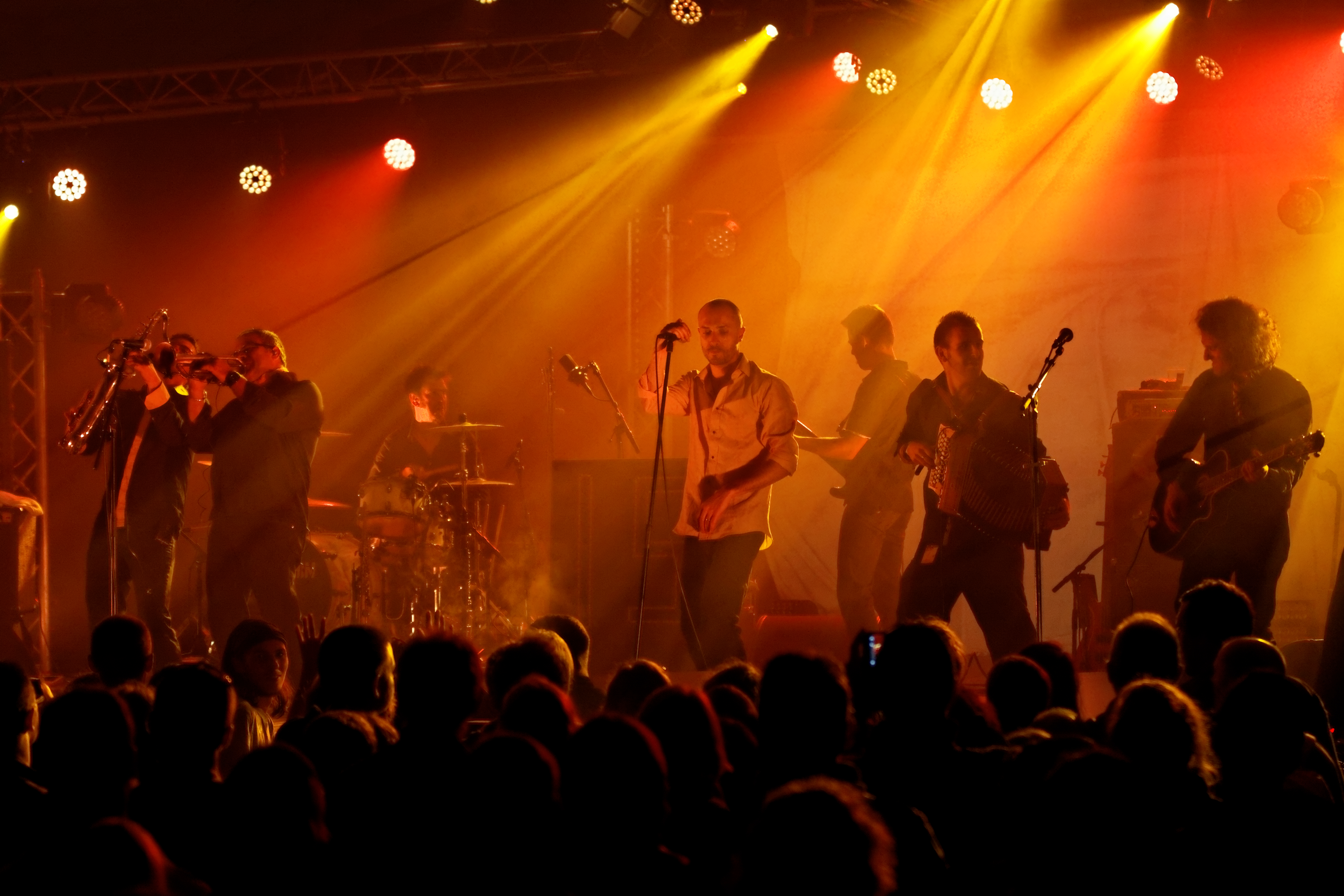 Merzhin en concert à l'espace évêché lors du festival de Cornouaille 2012.